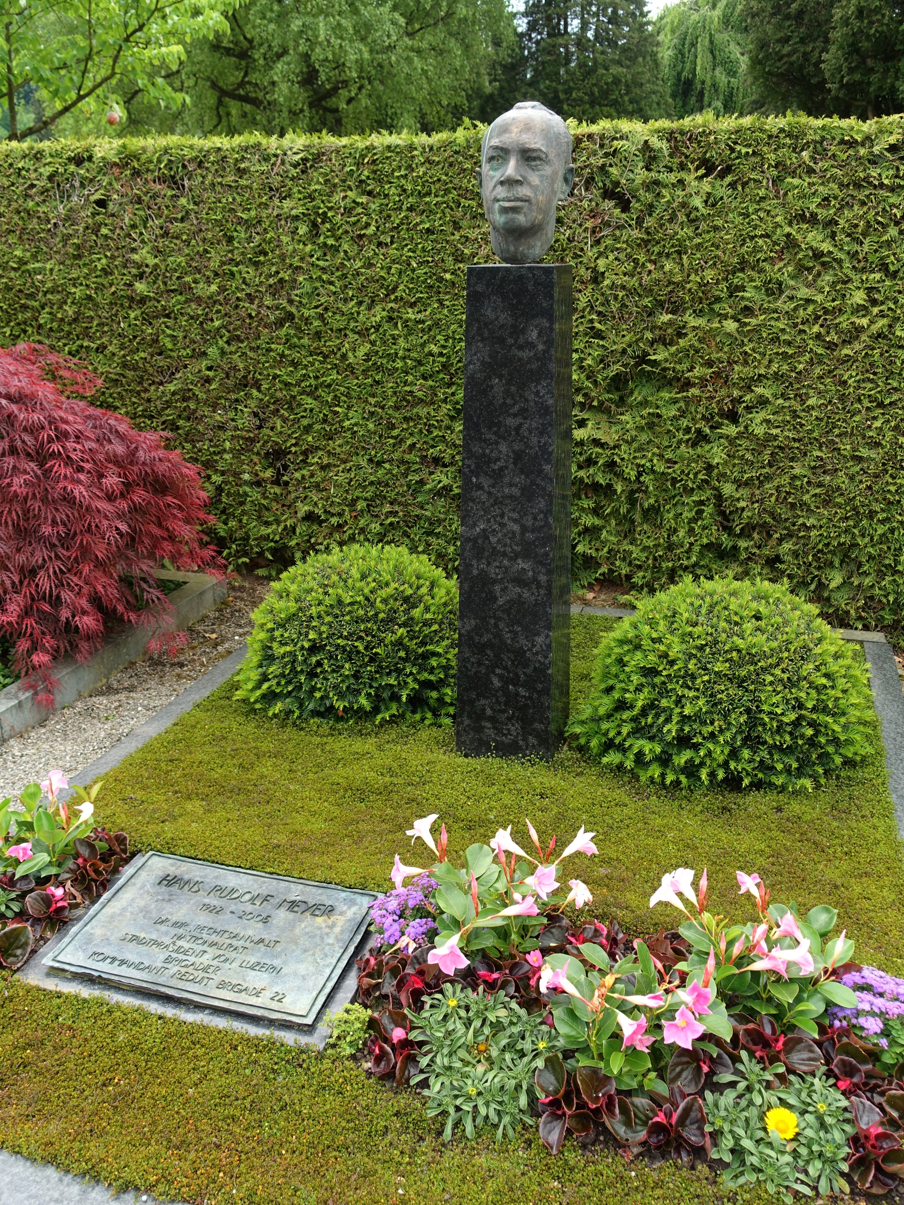 Hans Rudolf Meyer (1922–2005) Rechtsanwalt, Nationalrat, Stadtpräsident von Luzern. Grab auf dem Friedhof Friedental, Feld 10, Stadt Luzern